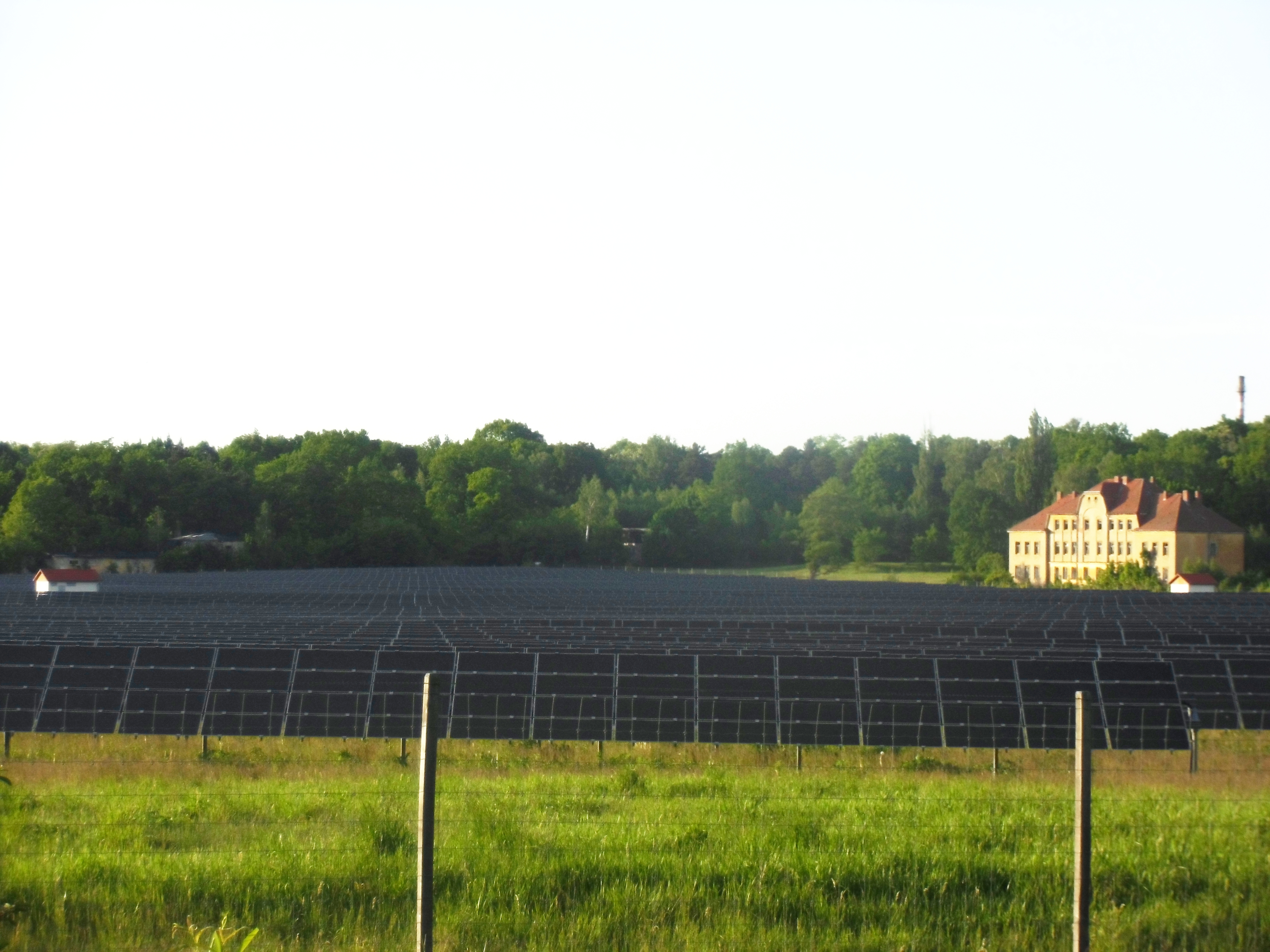 Solarpark nordwestlich von Königsbrück (Sachsen) im Neuen Lager